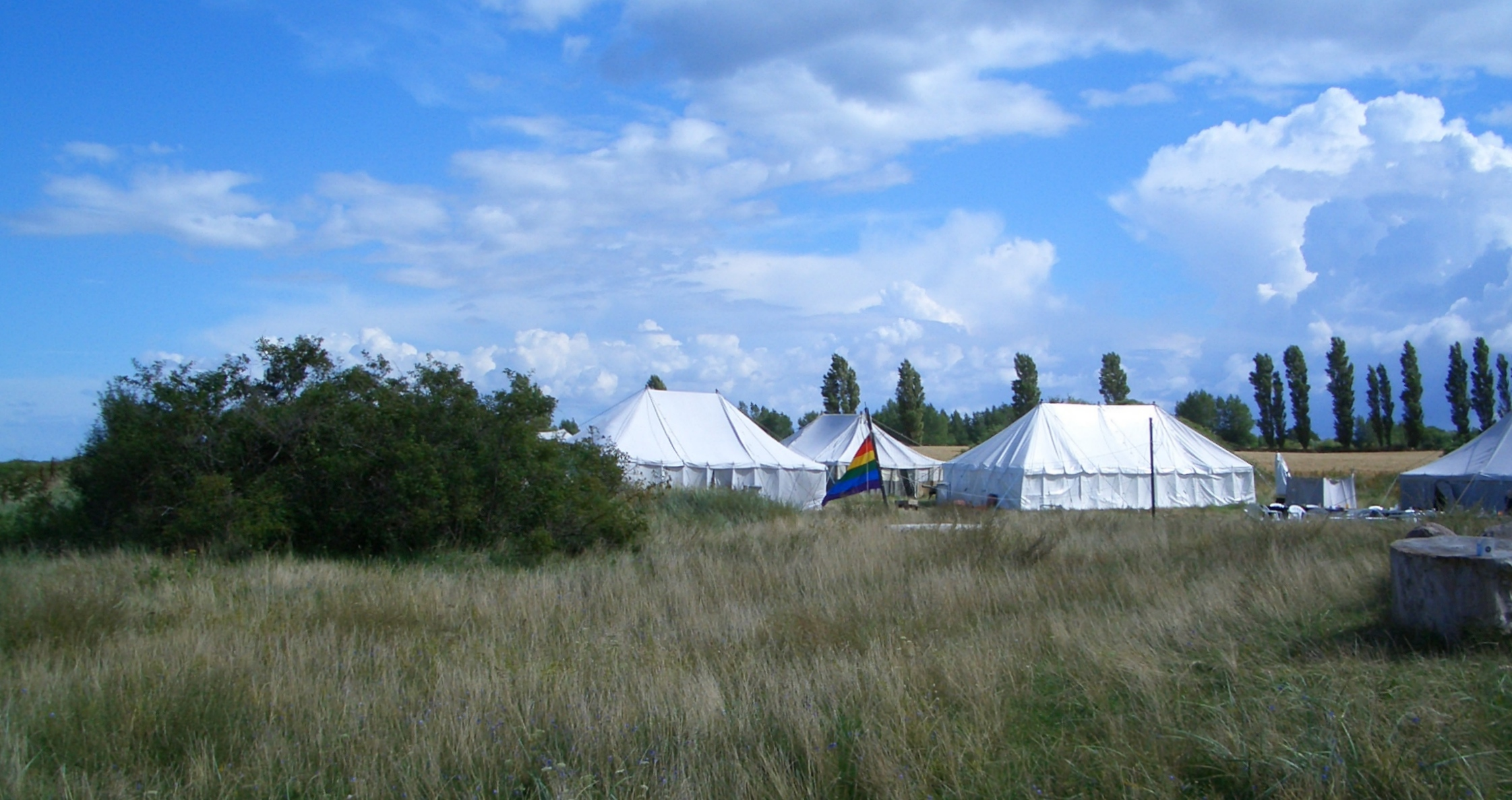 Women's camp Femø